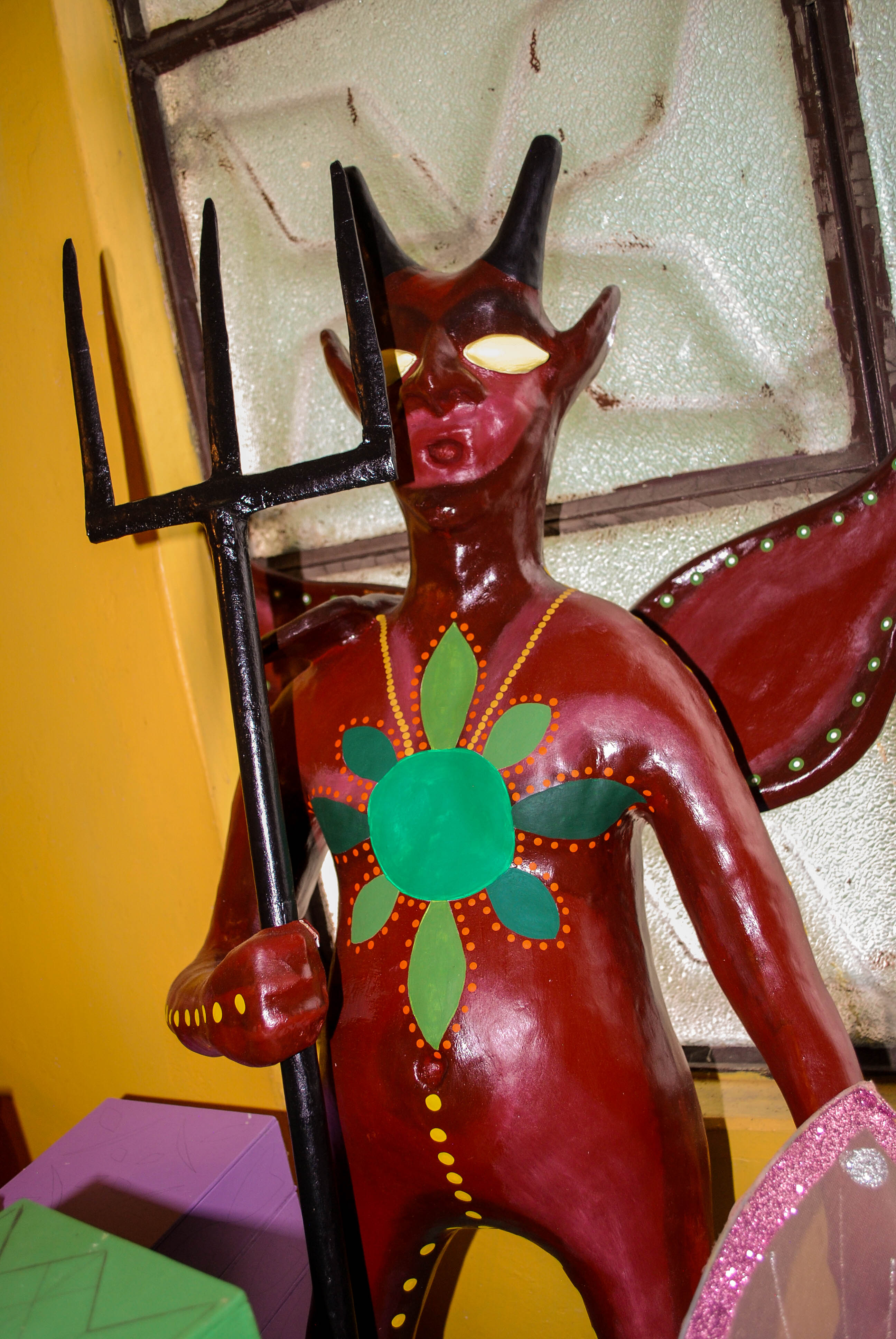 Alebrije hecho en el taller de Flavio Daniel Gutierrez Falfan.